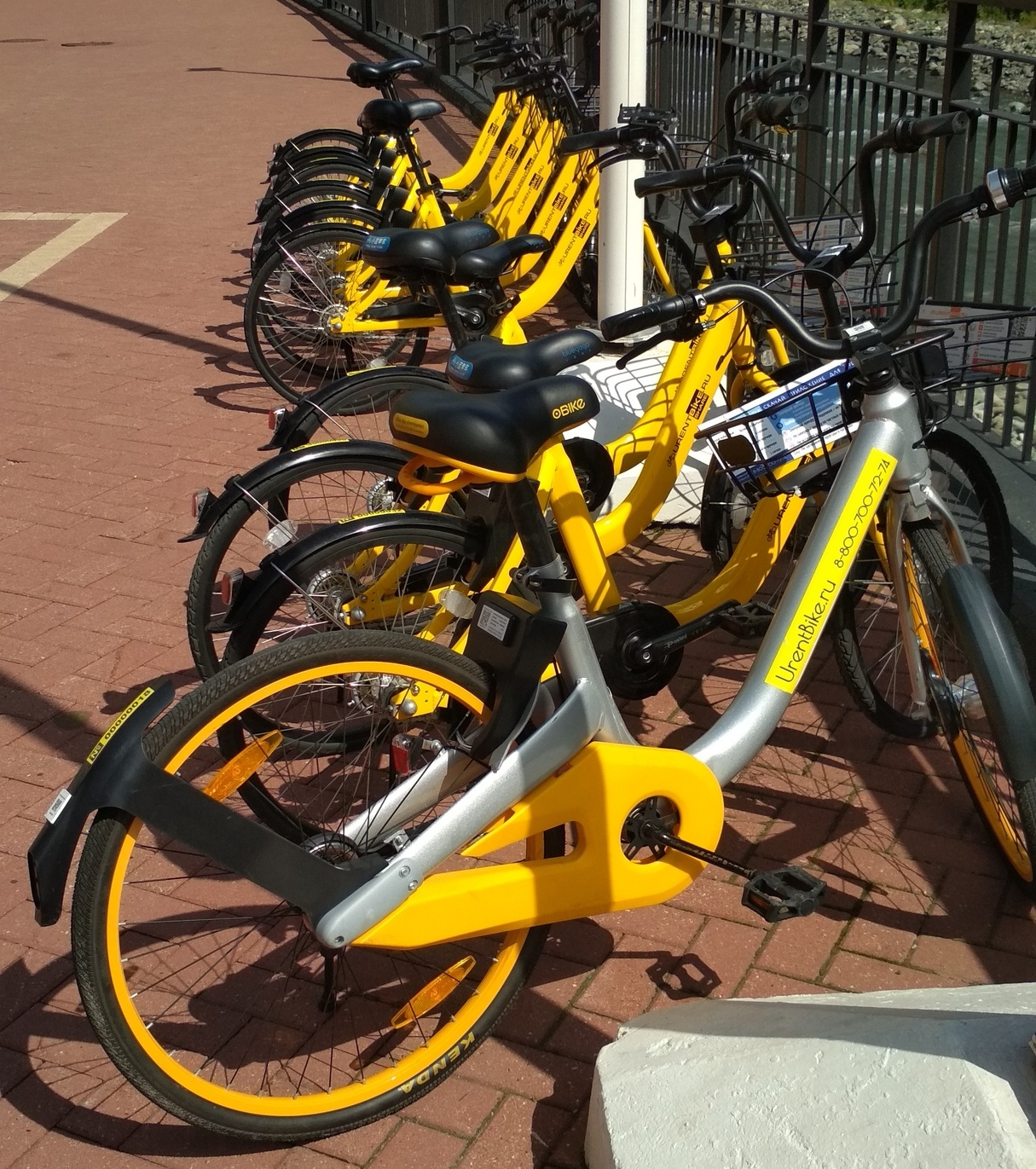 Велошеринг URentBike на Розе Хутор